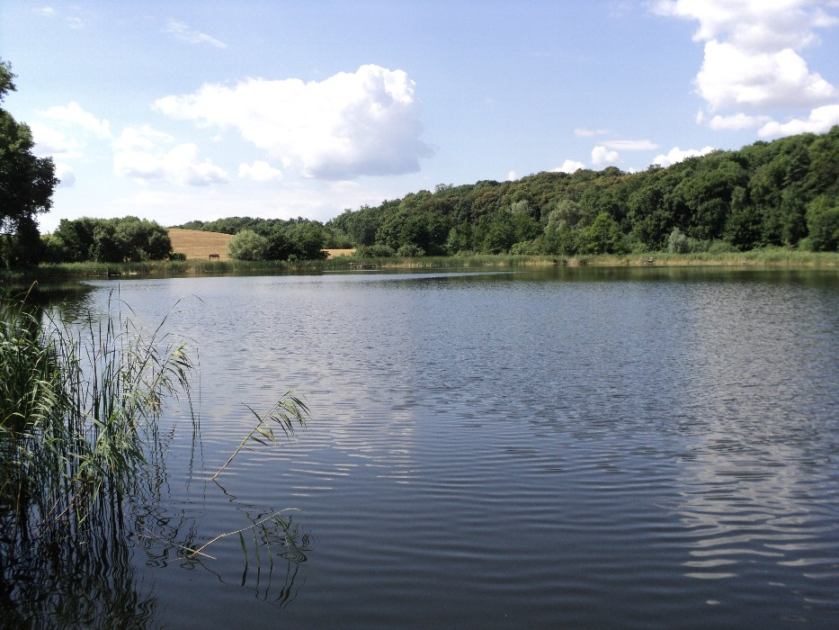 Der Salzsee, vom Badesteg aus gesehen.